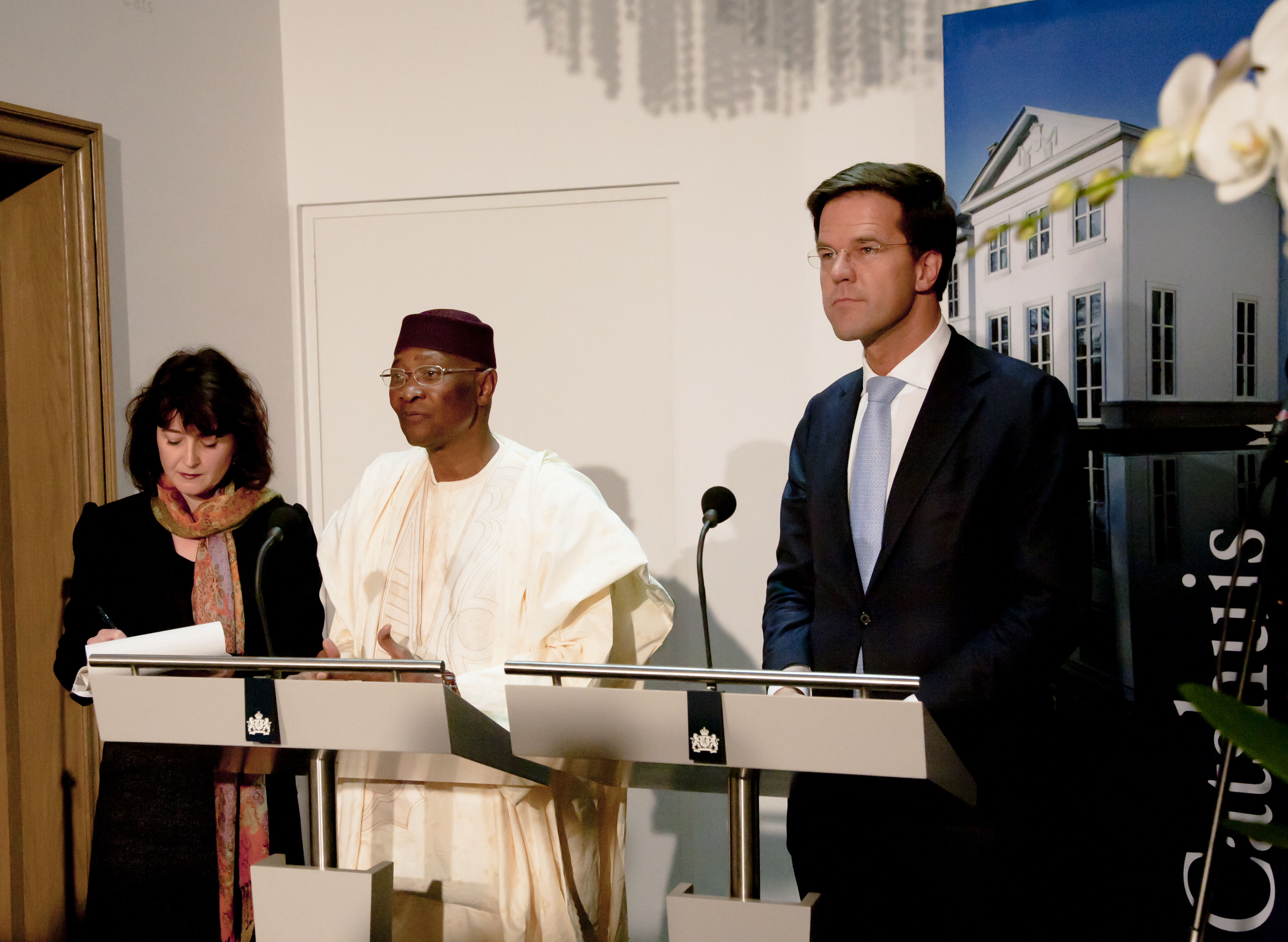 Minister-president Rutte en president Touré van Mali staan de pers te woord in het Catshuis.